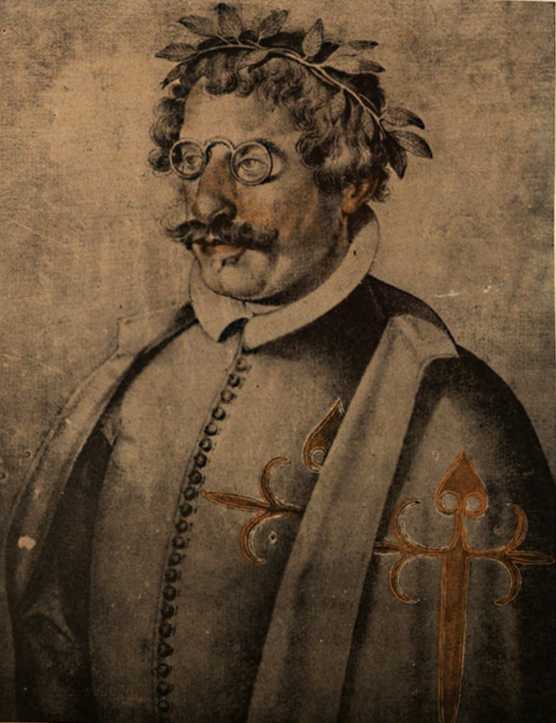 Retrato de Francisco de Quevedo en Francisco Pacheco, El libro de descripción de verdaderos retratos, ilustres y memorables varones, [Sevilla], [1599].